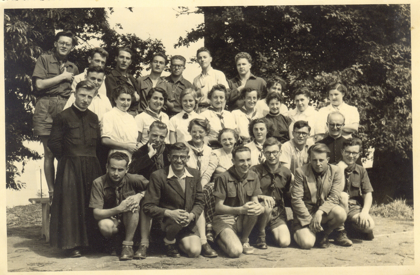 Abbé Paul Pierrat lors d'un rassemblement avec des responsables scouts vers 1955